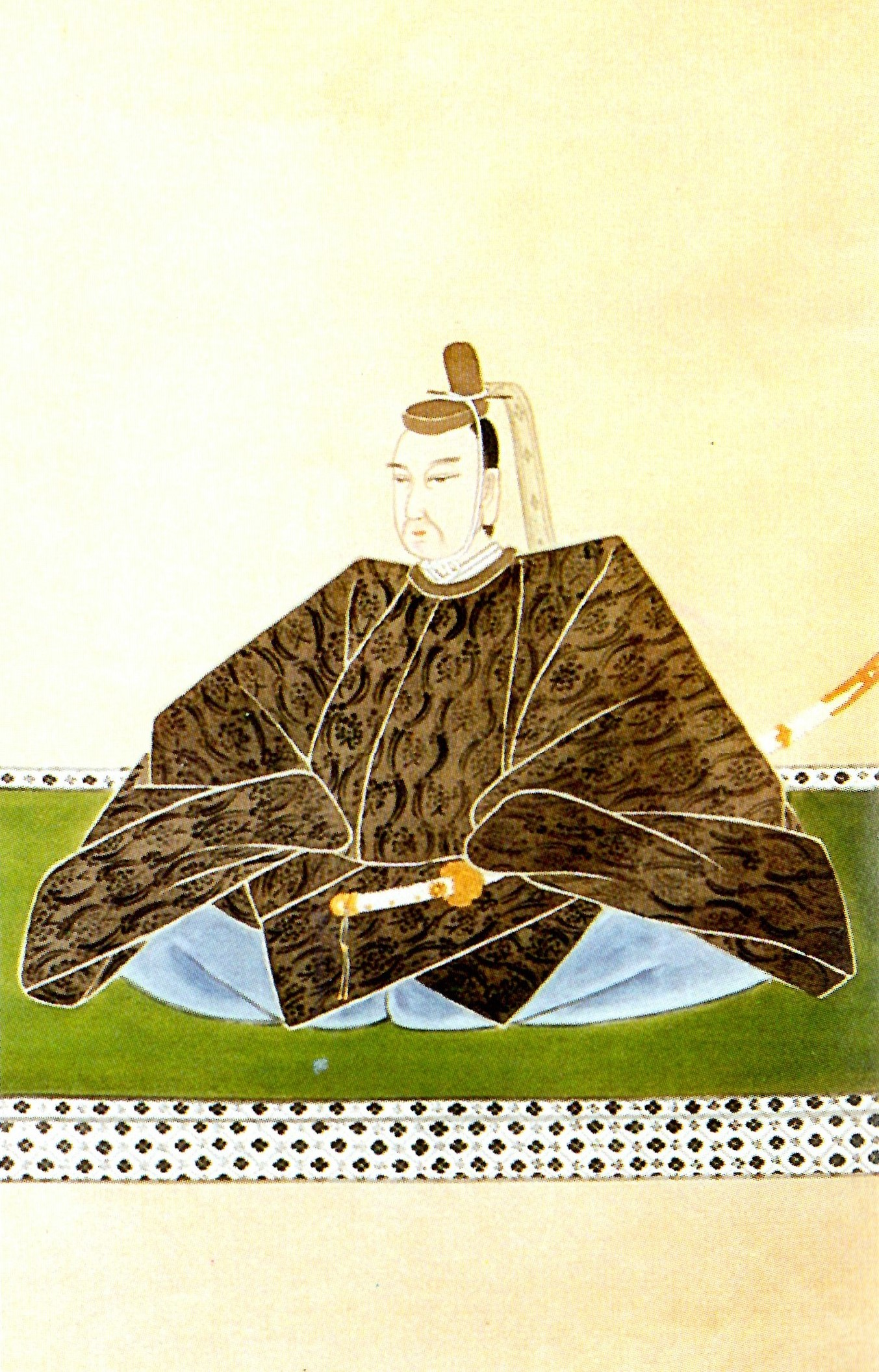 戸田氏英の肖像。